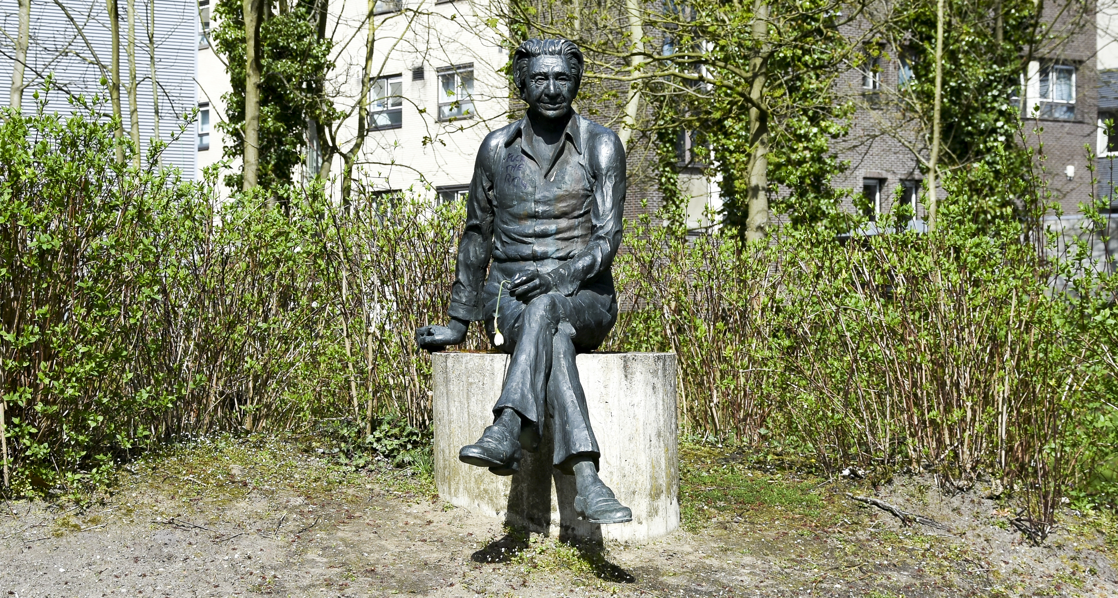 Jan Van den Brande - Armand Preud'homme Hasselt